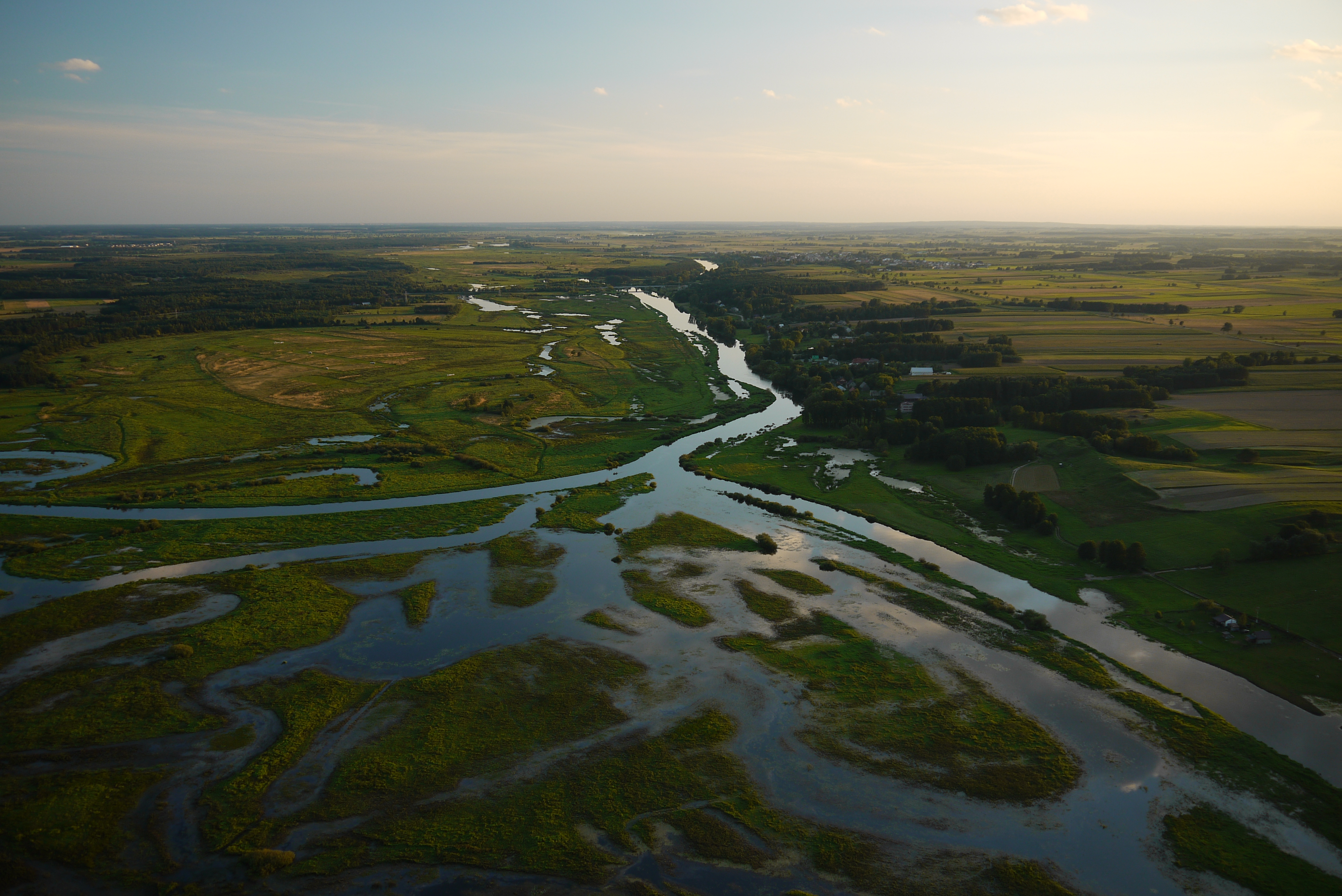 widok z lotu ptaka, ok 3km od Wizny